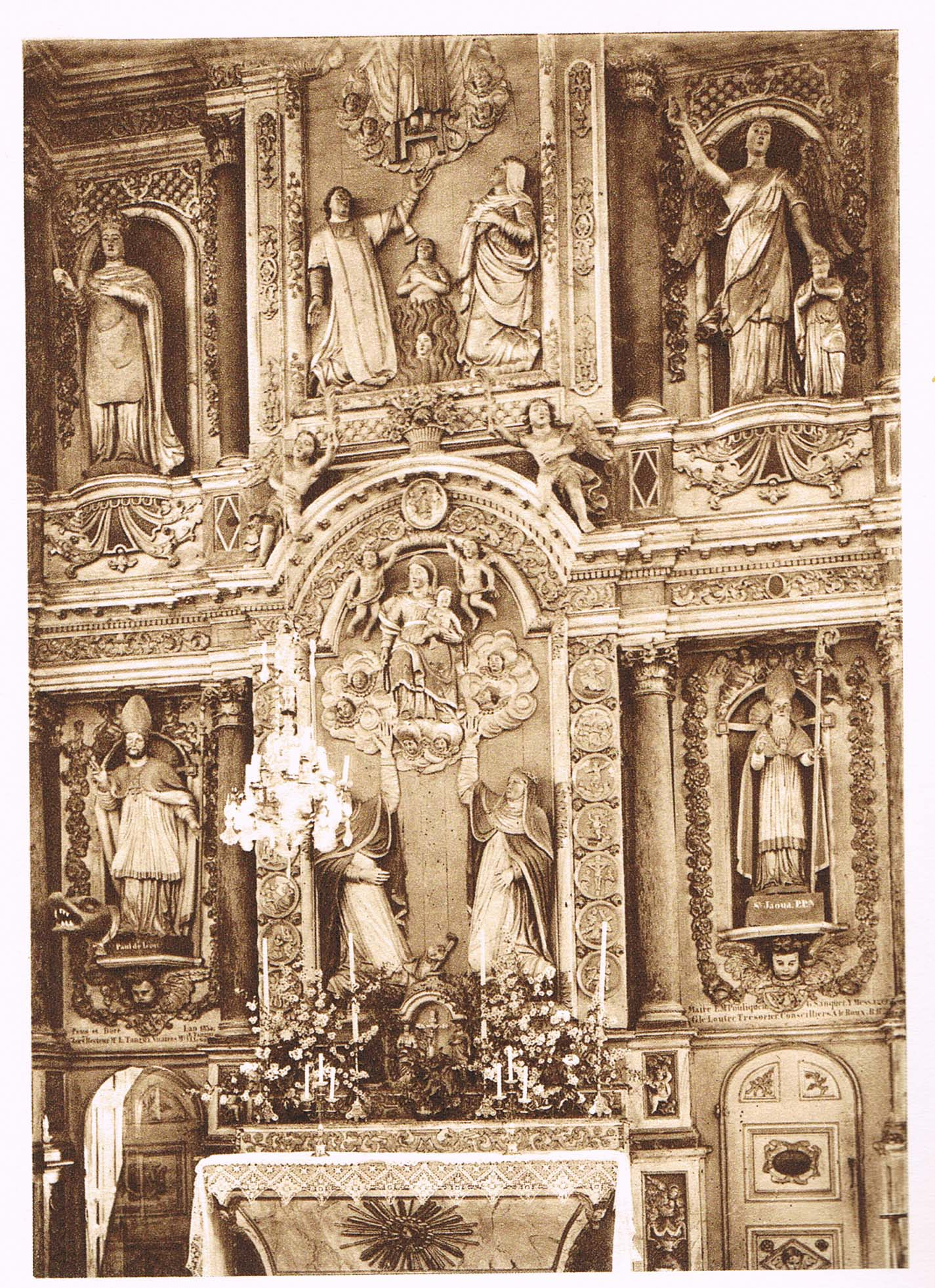 Retablo en la kirko Notre-Dame de Saint-Thégonnec, videblas Sankta Paŭlo maldekstre kaj Sankta Jaoua dekstre